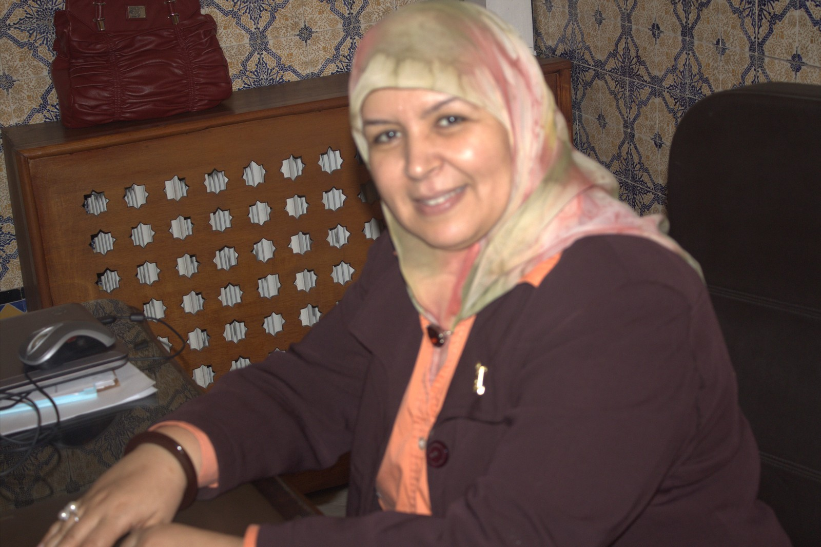 Meherzia Labidi Maïza, première vice-présidente de l'assemblée nationale constituante de 2011. Original description: النائبة محرزية العبيدي